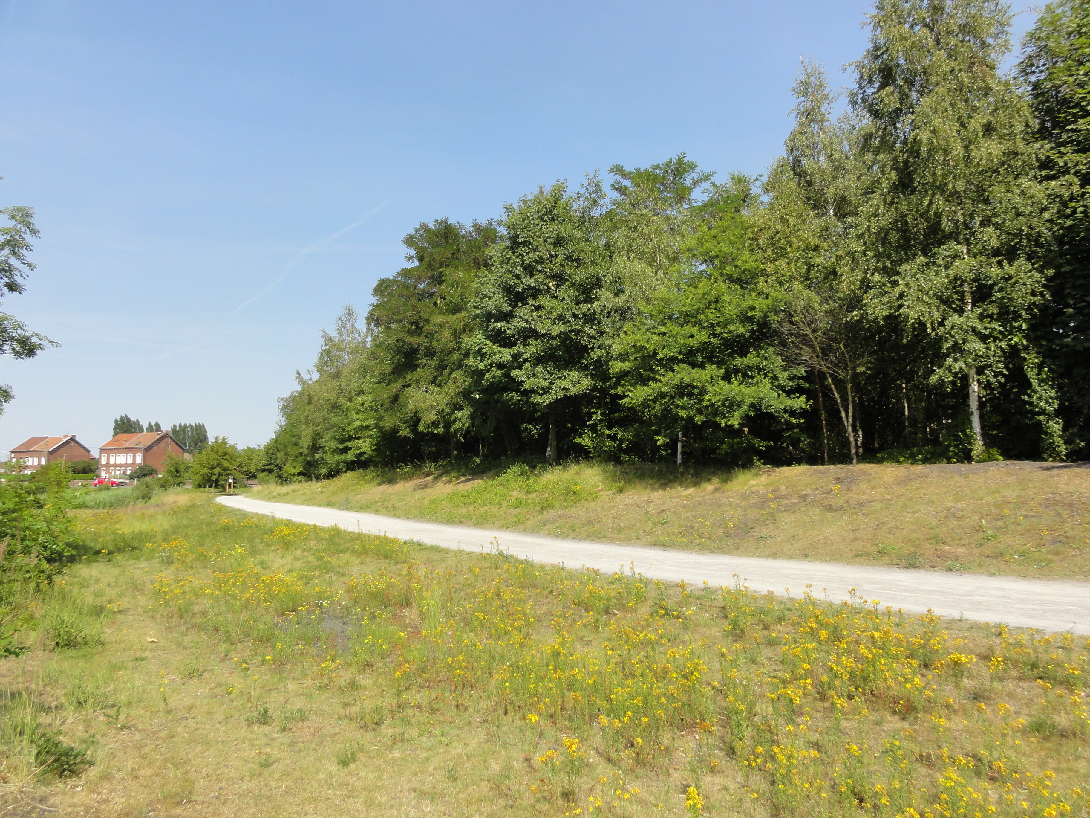 Terril n° 136A dit Roost Lains Est, Fosse n° 9 de la Compagnie des mines de l'Escarpelle, Roost-Warendin, Nord, Nord-Pas-de-Calais, France.